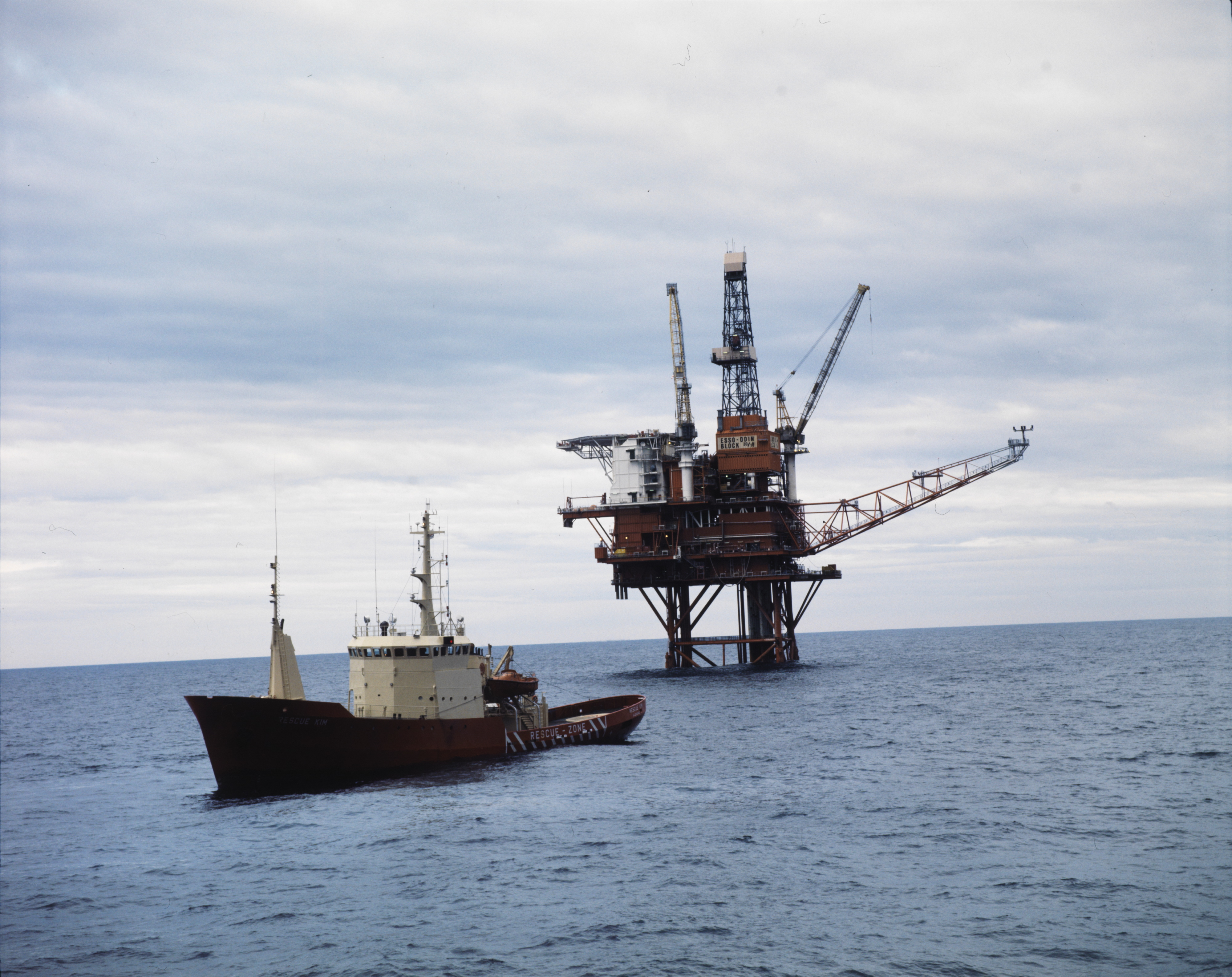 Foto av oljeplatformen Odin med supplyskipet Rescue Kim. Odin oljeplatform og Rescue Kim. Odin feltet - operatør Esso.Blokk 30/10